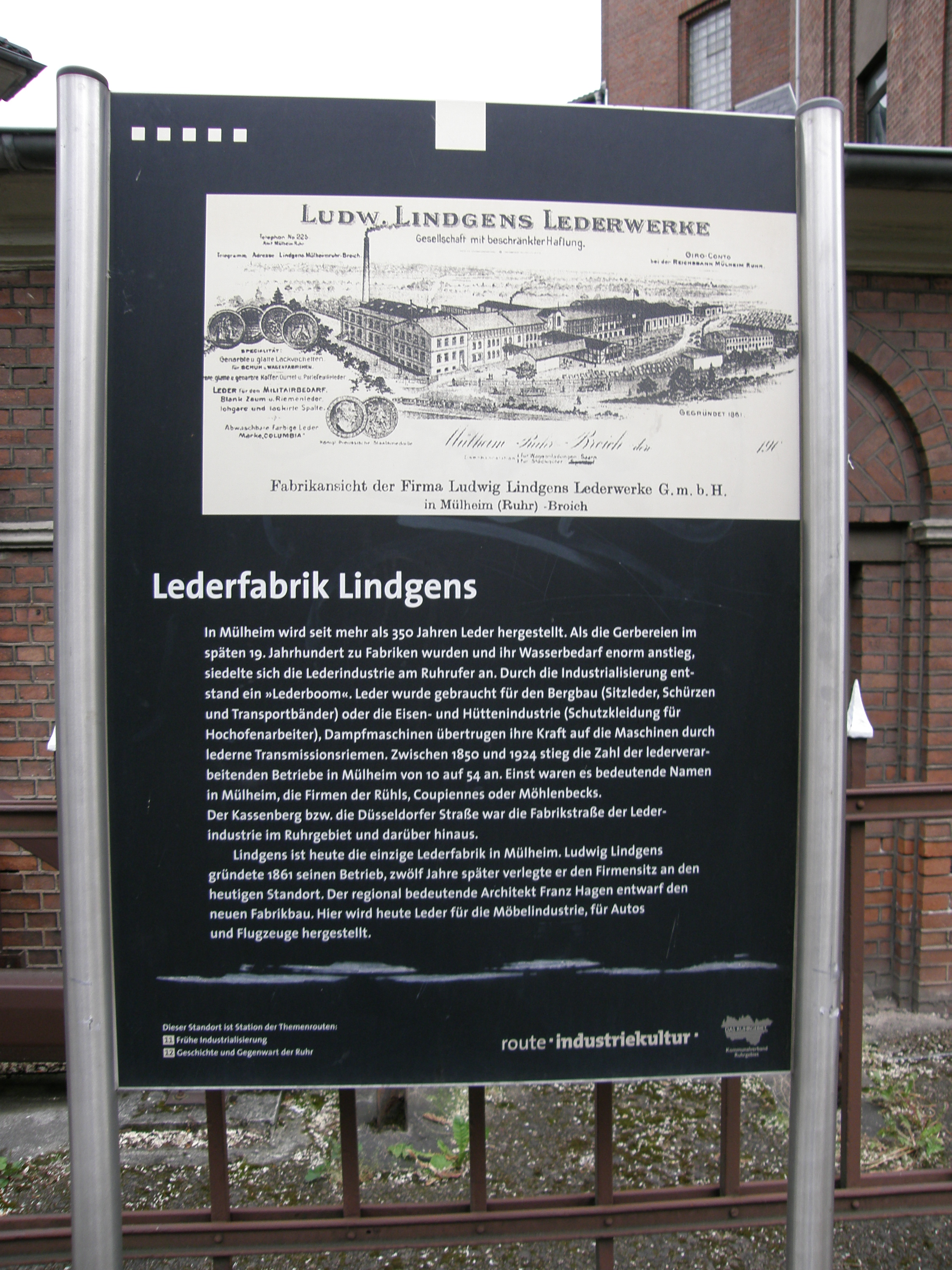 Hinweisschild der Route der Industriekultur zur Lederfabrik Lindgens in Mülheim an der Ruhr